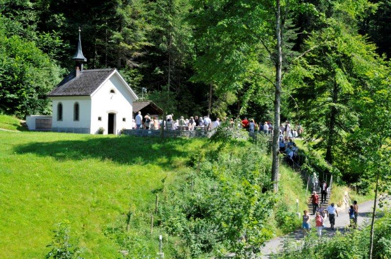 Pilger auf dem Weg zum Badbrünnli